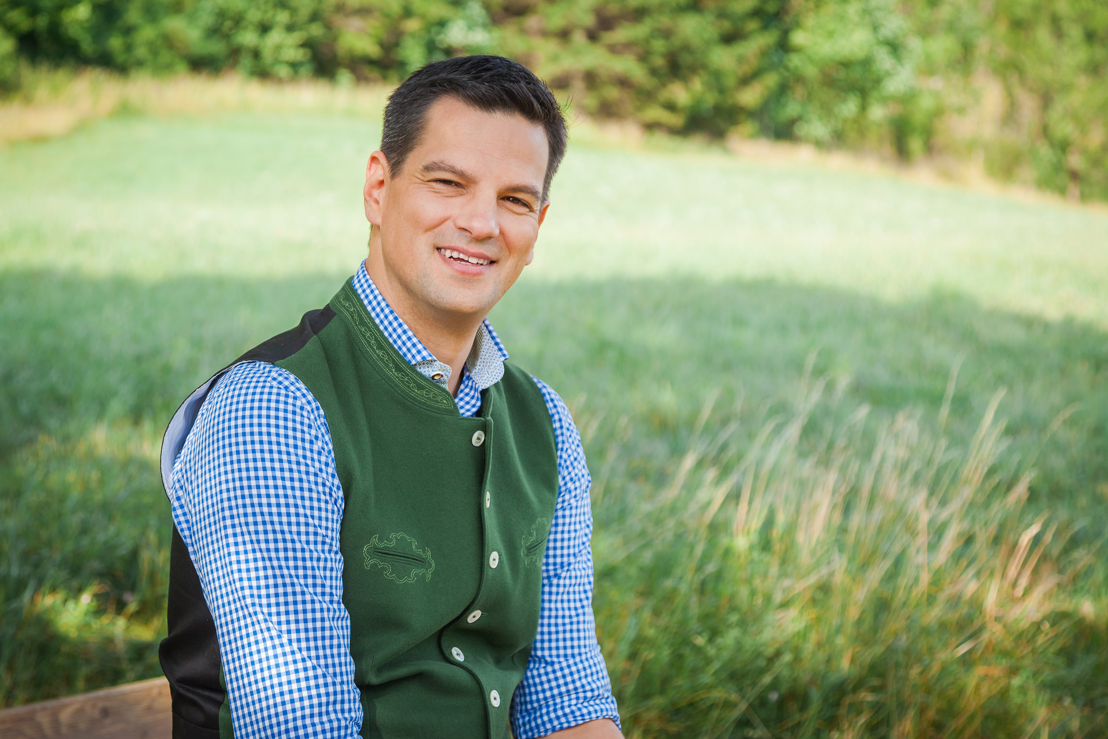 NAbg. Mag. Hannes Amesbauer, BA